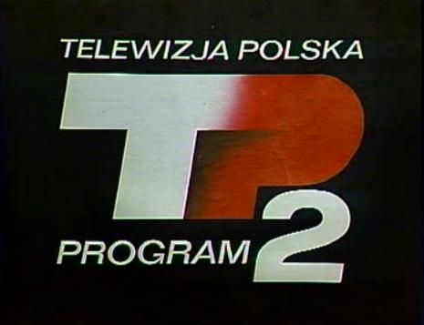 Pierwsze logo TVP2 używane od 2 października 1970 r. do Sylwestra 1980 roku